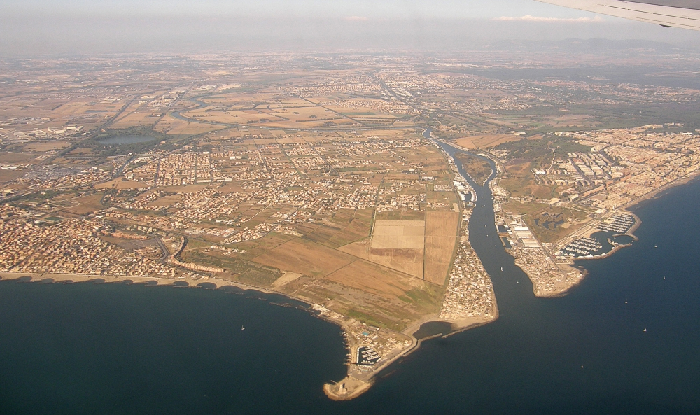 Fiumicino. A sinistra il lago di Traiano; a destra la foce del Tevere e l'Isola Sacra.